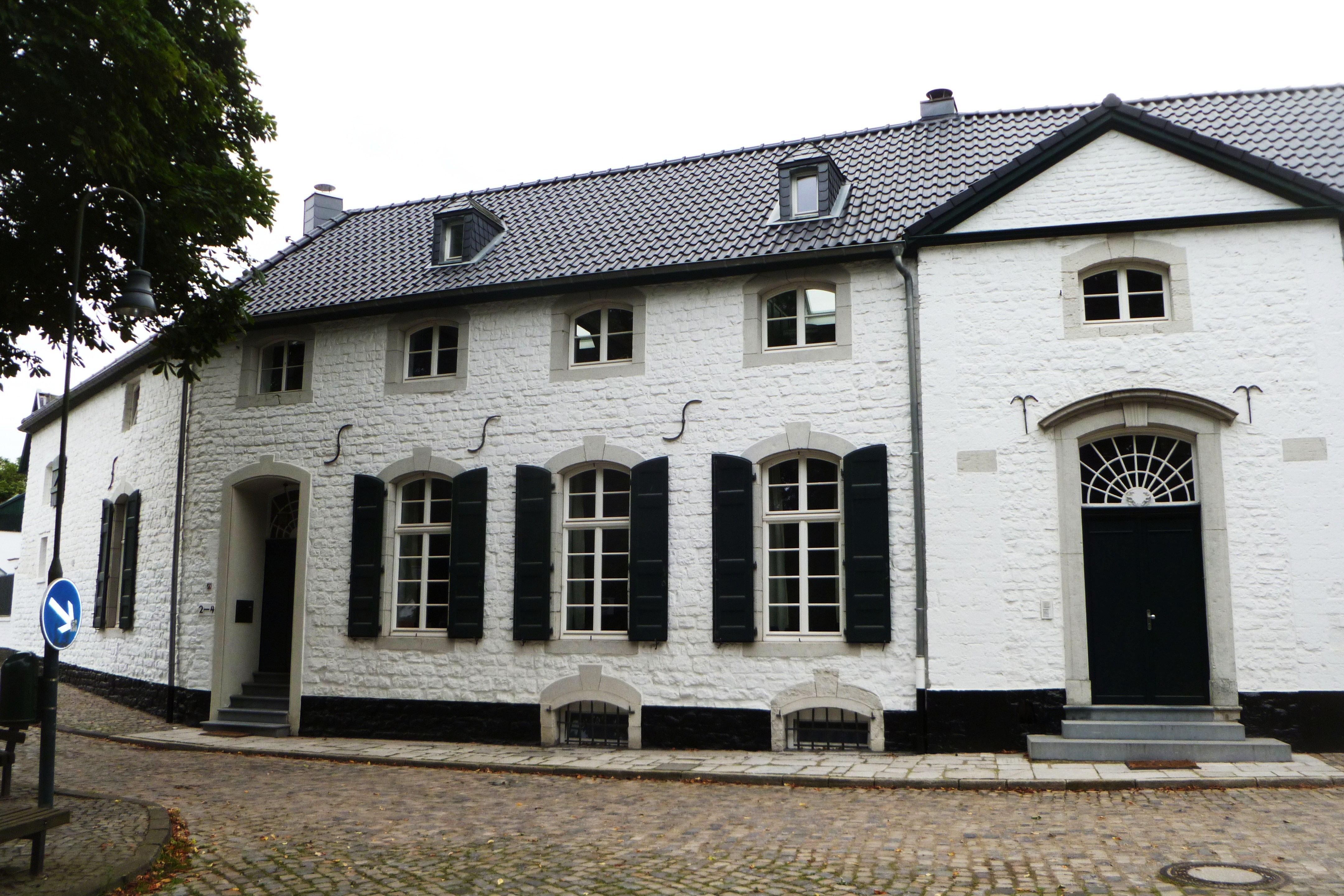 Baudenkmal in Aachen-Laurensberg